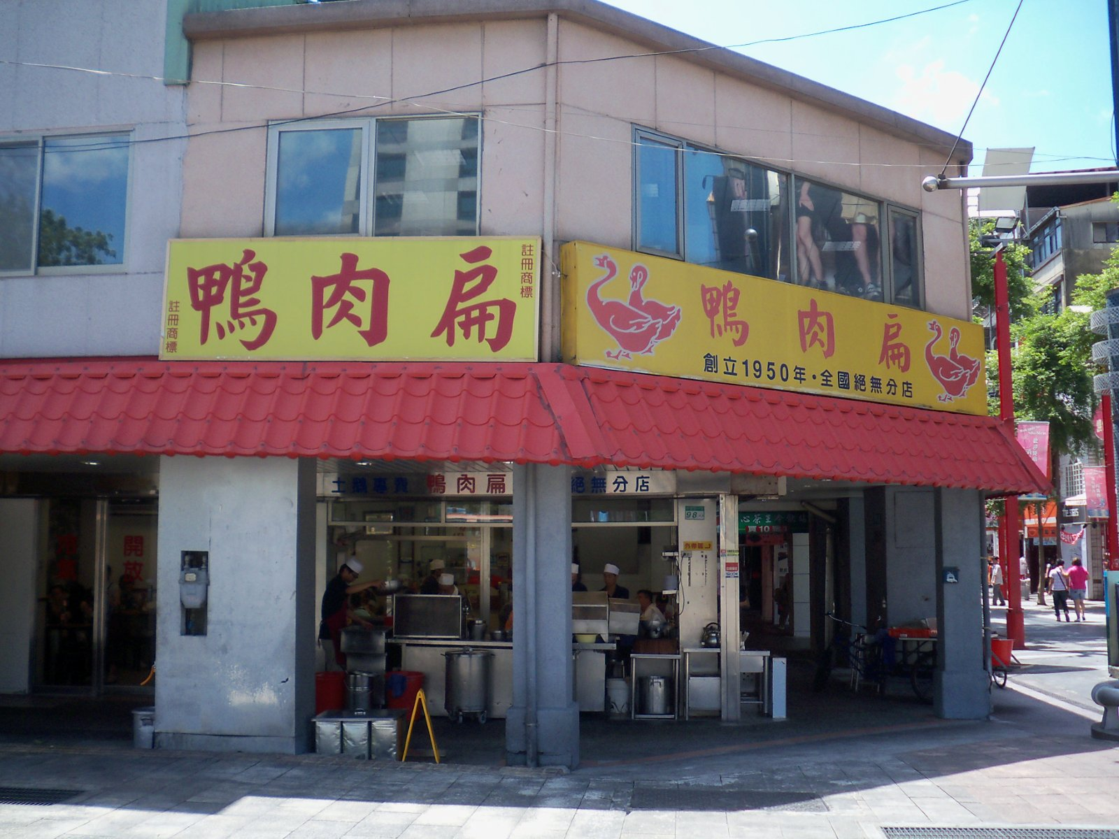 台湾グルメ・鴨肉扁（台北市万華区武昌街二段2号）。